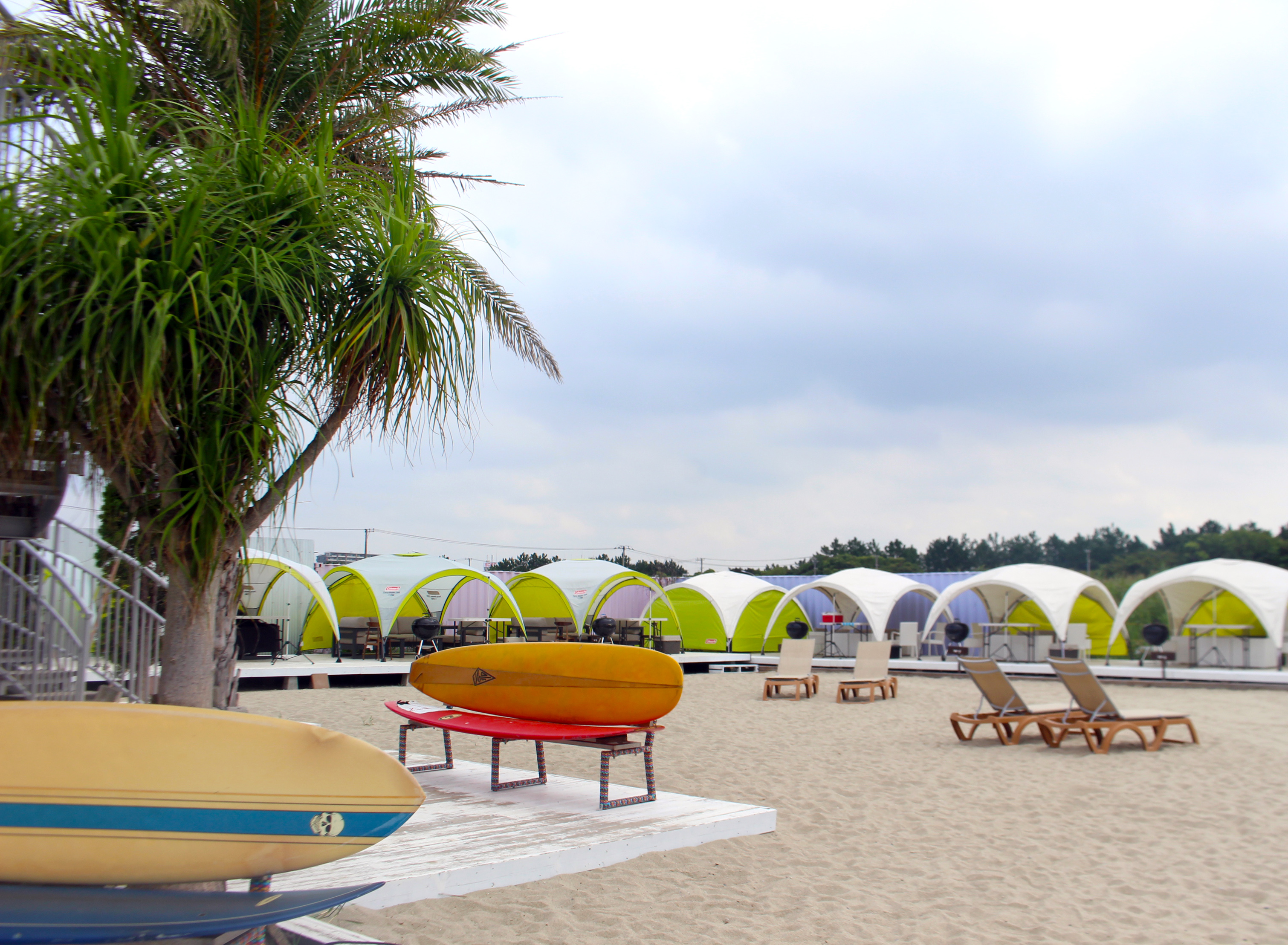 Park Magic パークマジック（BBQ施設）